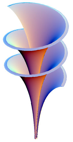 Dini's surface. superficie di Dini.